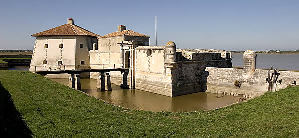 Fort Lupin - côté est - Charente-Maritime Photo issue de ma banque d'images : Pep.per 15 octobre 2006 à 00:43 (CEST)